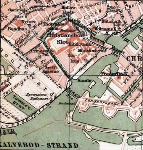 Udsnit af Image:Karte Kopenhagen MKL1888.jpg, der bl.a. viser den tidligere placering af Langebro. Højere opløsning end v0